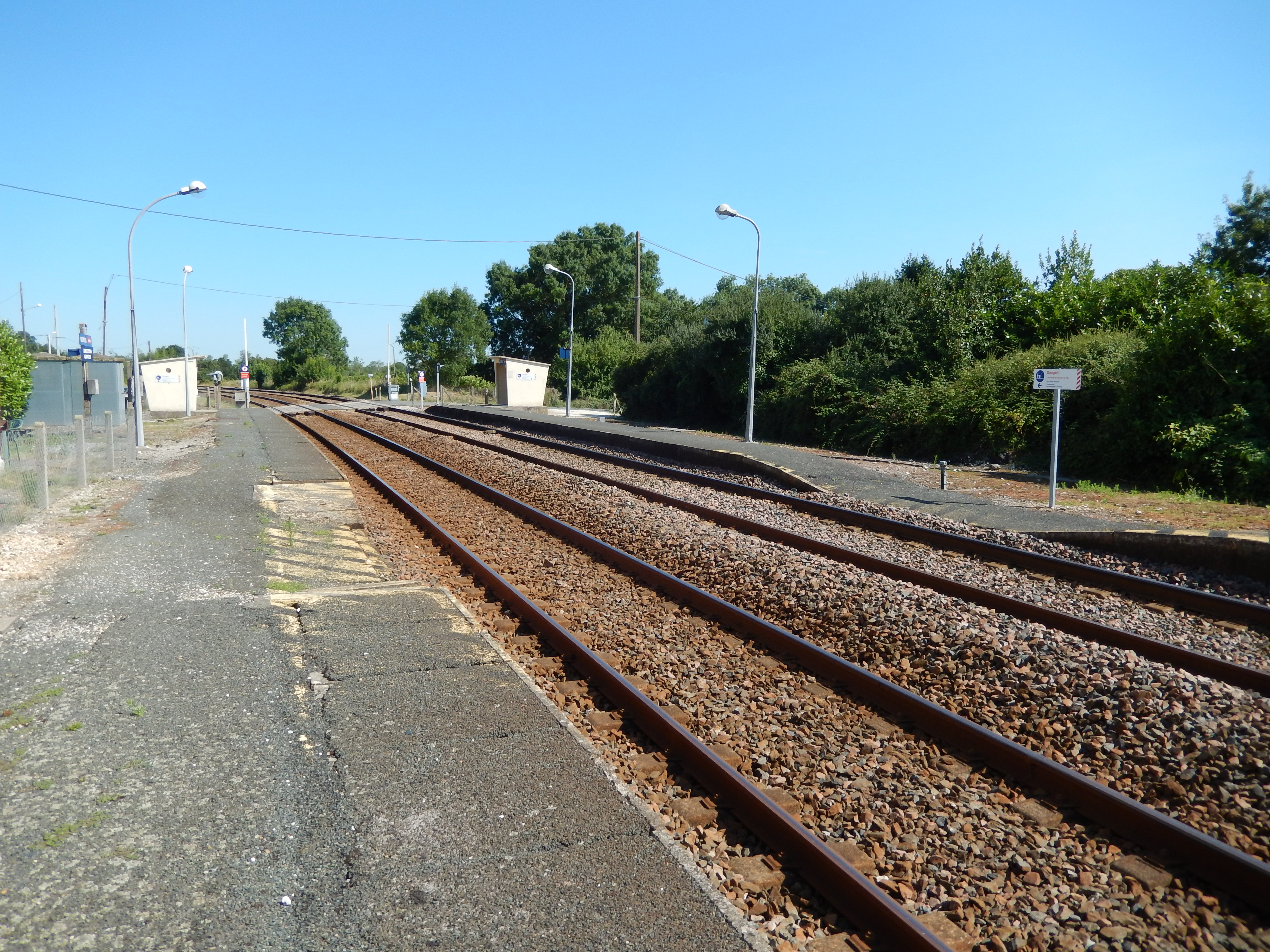 La gare SNCF de Bords (Charente-Maritime, France) est un Point d'Arrêt Non Géré sur la ligne SNCF reliant la Rochelle à Saintes. Bien que son bâtiment voyageurs soit fermé au public, des Trains Express Régionaux s'y arrêtent. Les trains en direction de Saintes roulent sur la voie visible sur la gauche de l'image, les trains en direction de la Rochelle sur l'autre voie. Au second plan, on aperçoit un passage à niveau pour la route départementale 118.